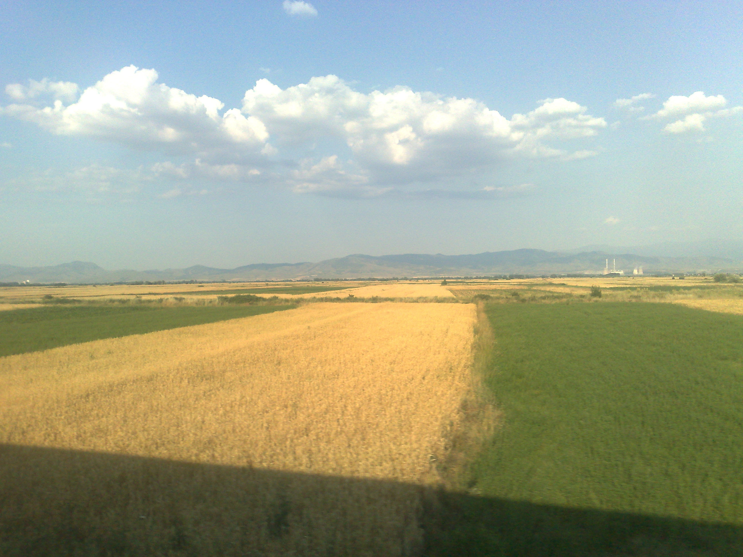 Пелагонија - РЕК „Битола“